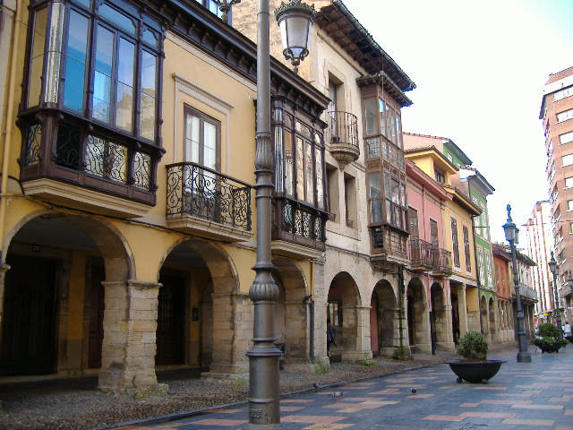 Calle de Galiana en Avilés, Asturias (España).